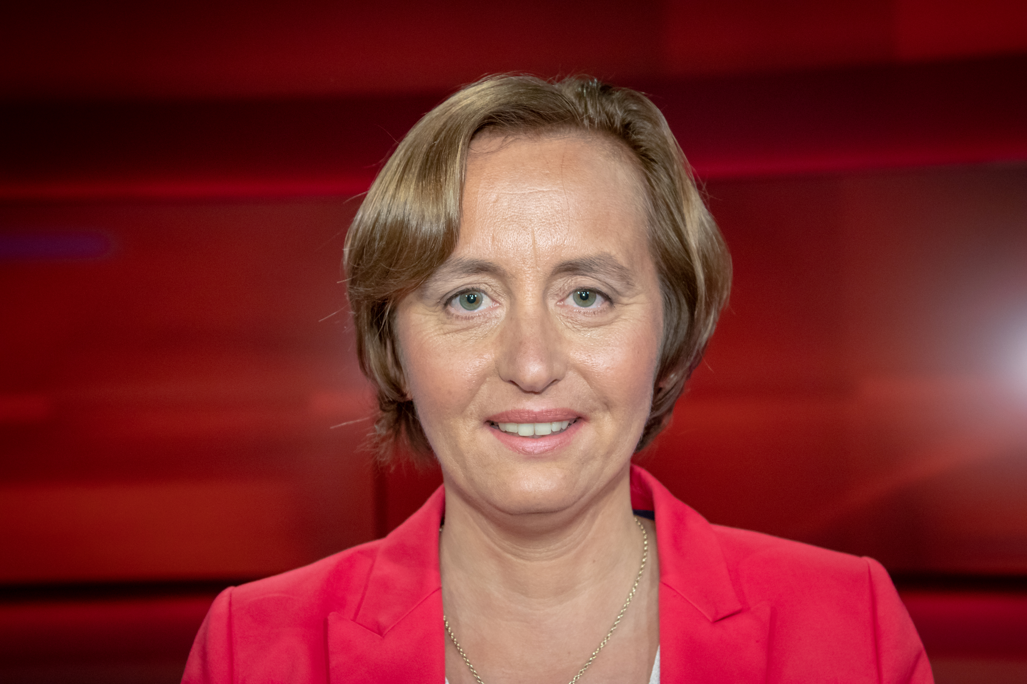 Beatrix von Storch in der WDR-Sendung "hart aber fair" 2019-01-14